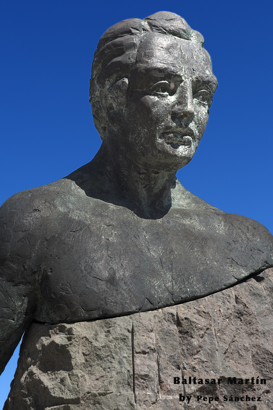 Busto de Baltasar Martín, héroe garafiano, por salvar a la isla de La Palma de los piratas franceses.